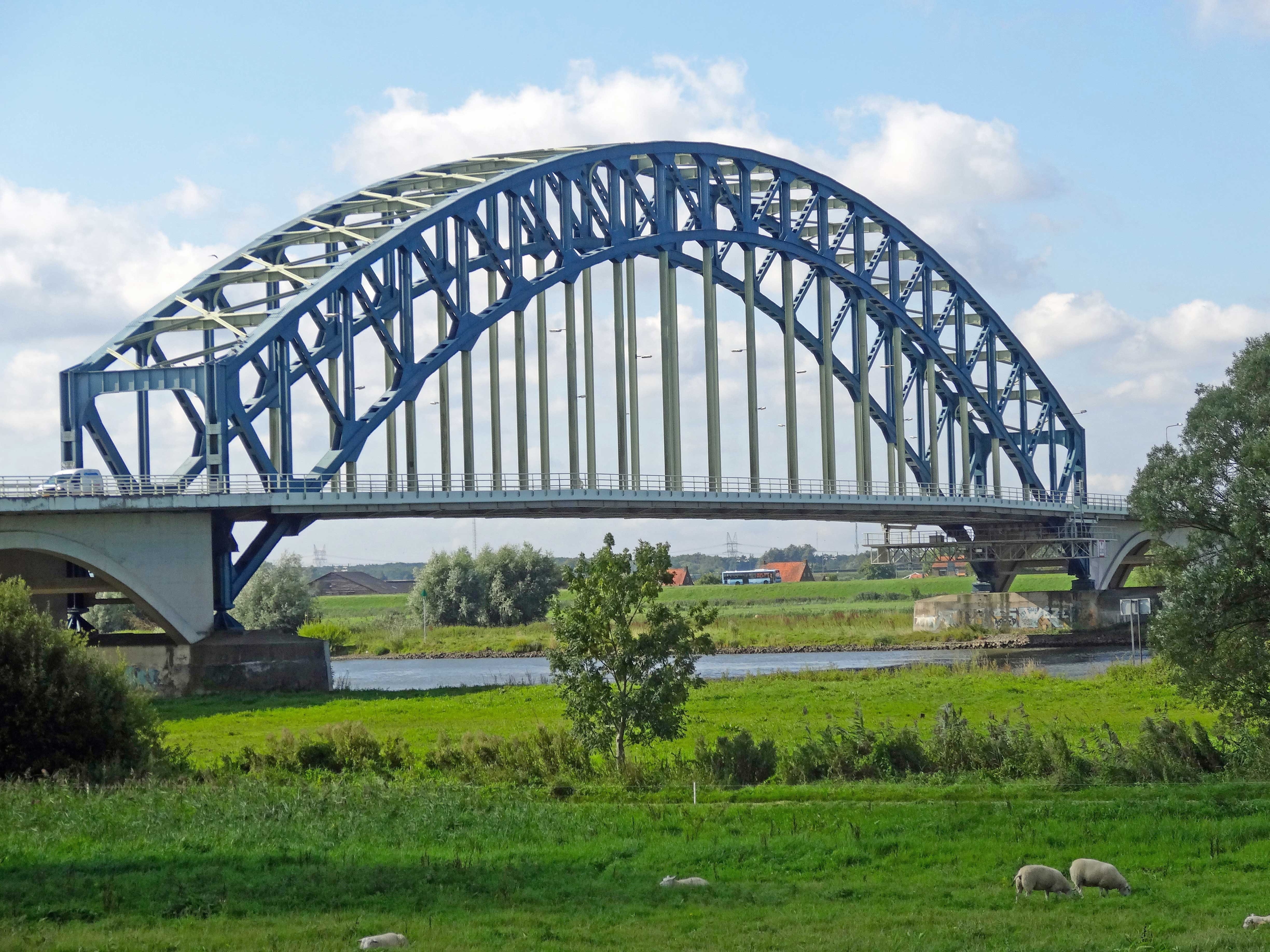 Brug over de IJssel bij Zwolle - Zuiderzeestraatweg